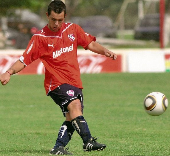 Federico Abruzzi en el Club Atletico Independiente